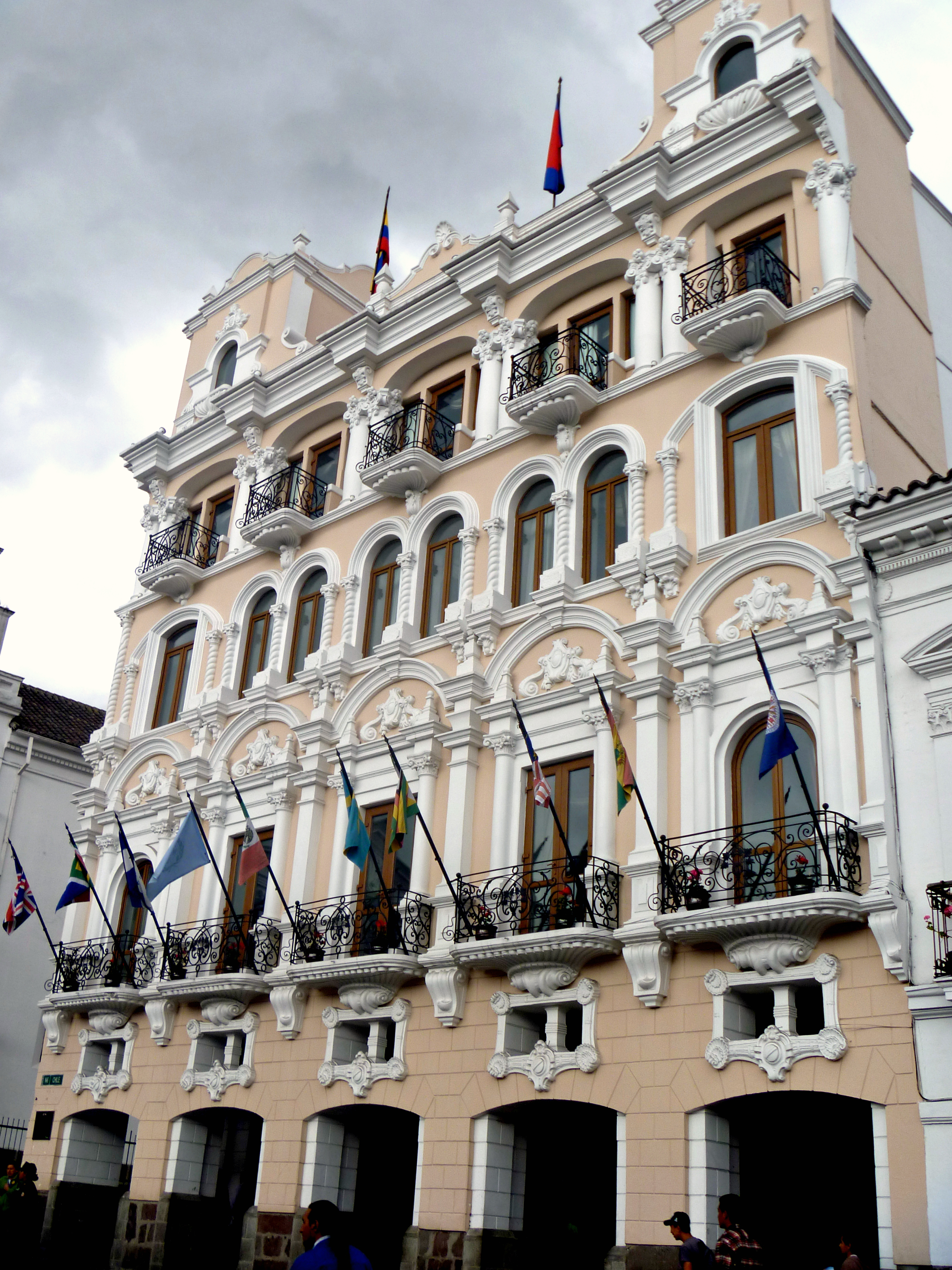 Palacio Hidalgo, en el flanco noroccidental de la Plaza de la Independencia de Quito. Actualmente ocupado por el Hotel Plaza Grande. Antiguamente funcionó en el mismo sitio el Hotel Majestic.